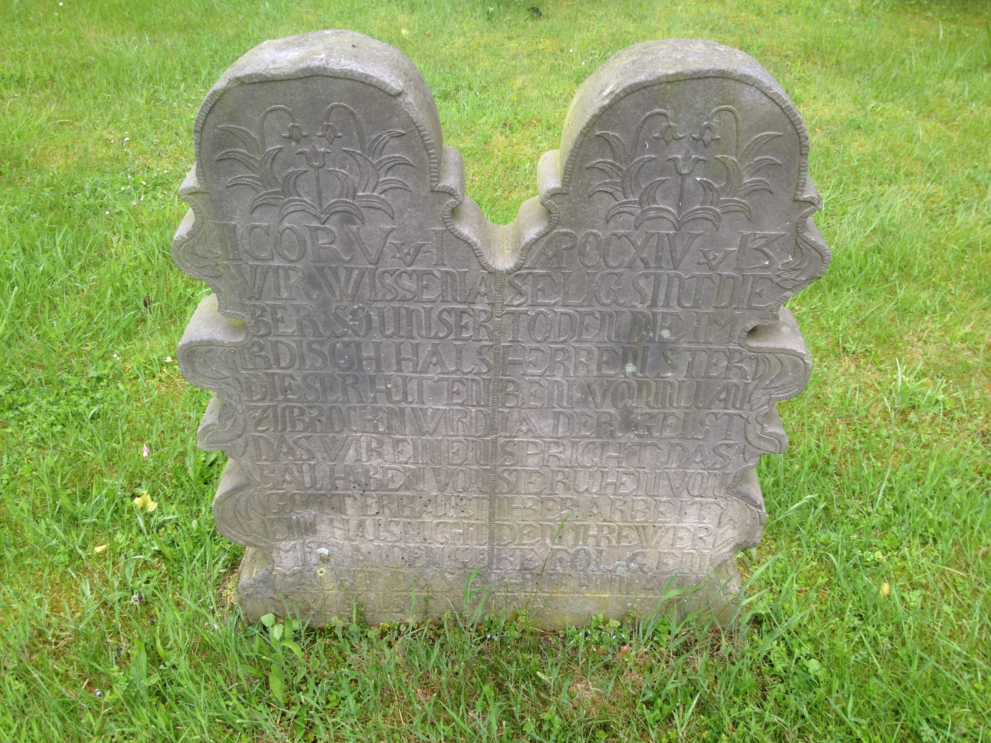 Deutschland - Nordrhein-Westfalen - Bad Salzuflen - Wüsten: Grabsteine bei der Evangelischen Kirche